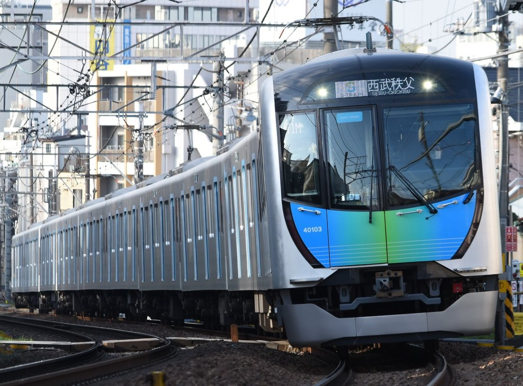 Seibu 40000 Series 40103 Formation S-TRAIN No.1 bound for Seibu-Chichibu.